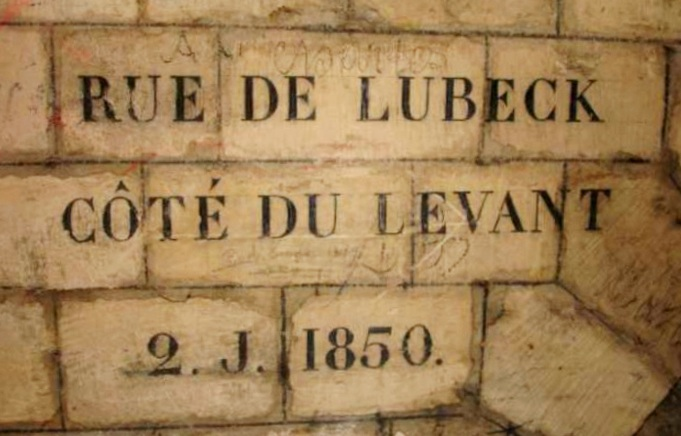 Inscription dans un réseau d'anciennes carrières sous la rue de Lubeck, à Paris.